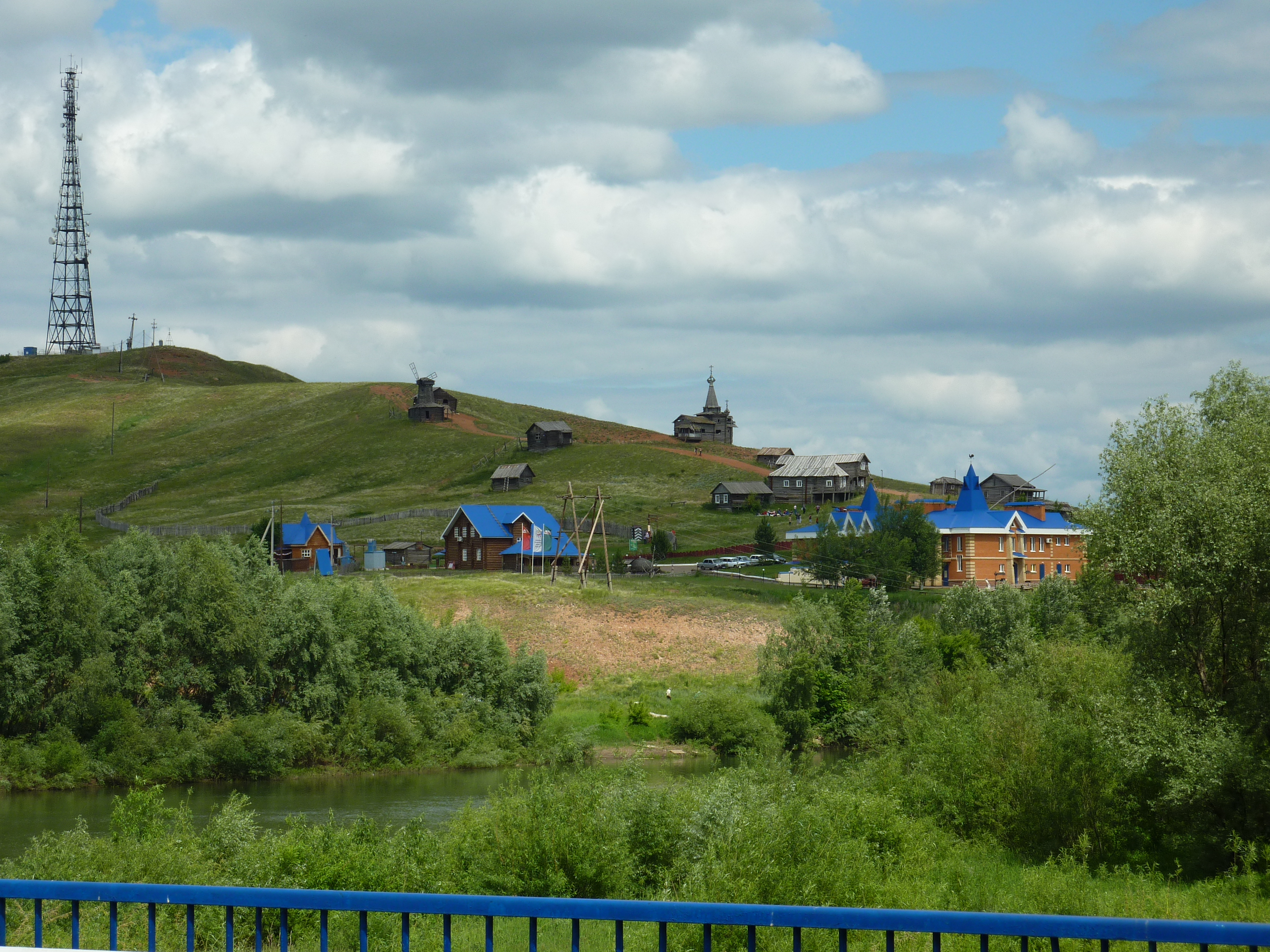 База отдыха